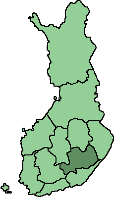 The Finnish province of Mikkeli (Mikkelin lääni) as of 1997